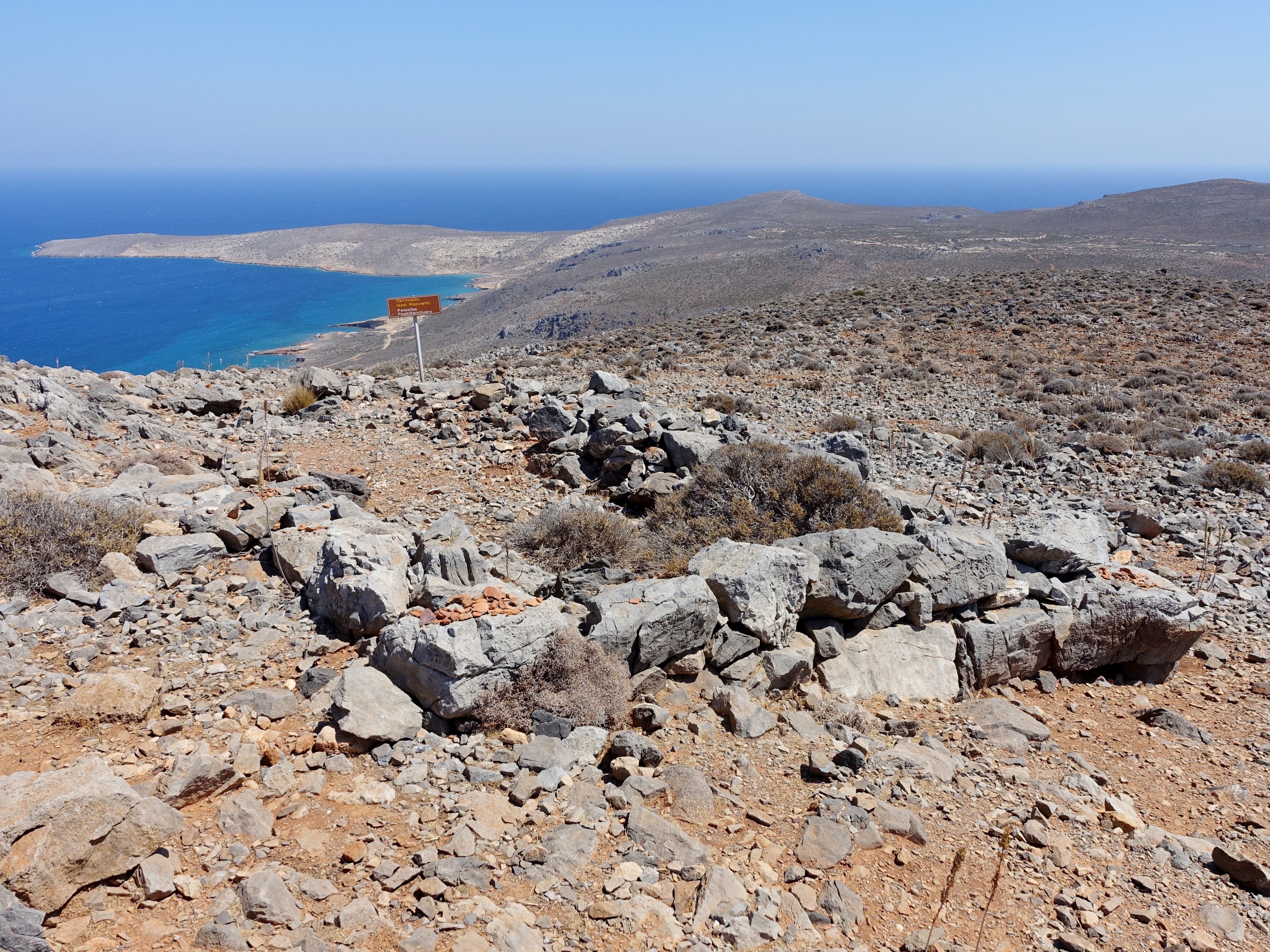 Reste des minoischen Gipfelheiligtums Petsophas auf dem gleichnamigen Berg Petsofas bei Palekastro, Gemeinde Sitia, Kreta, Griechenland